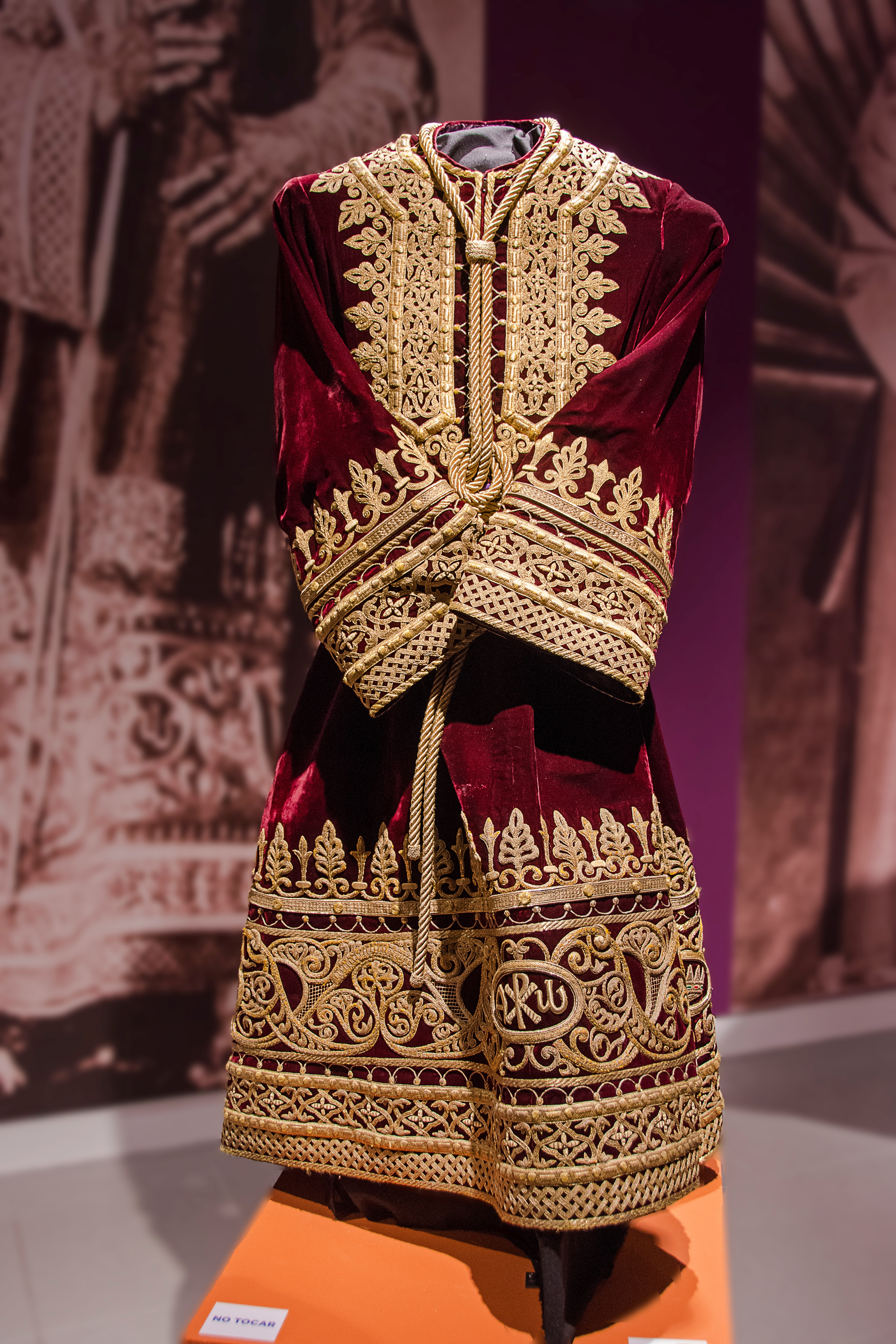 Túnica bordada denominada "túnica persa" perteneciente a la hermandad del Gran Poder de Sevilla. Diseño y bordado de Juan Manuel Rodríguez Ojeda del año 1908.